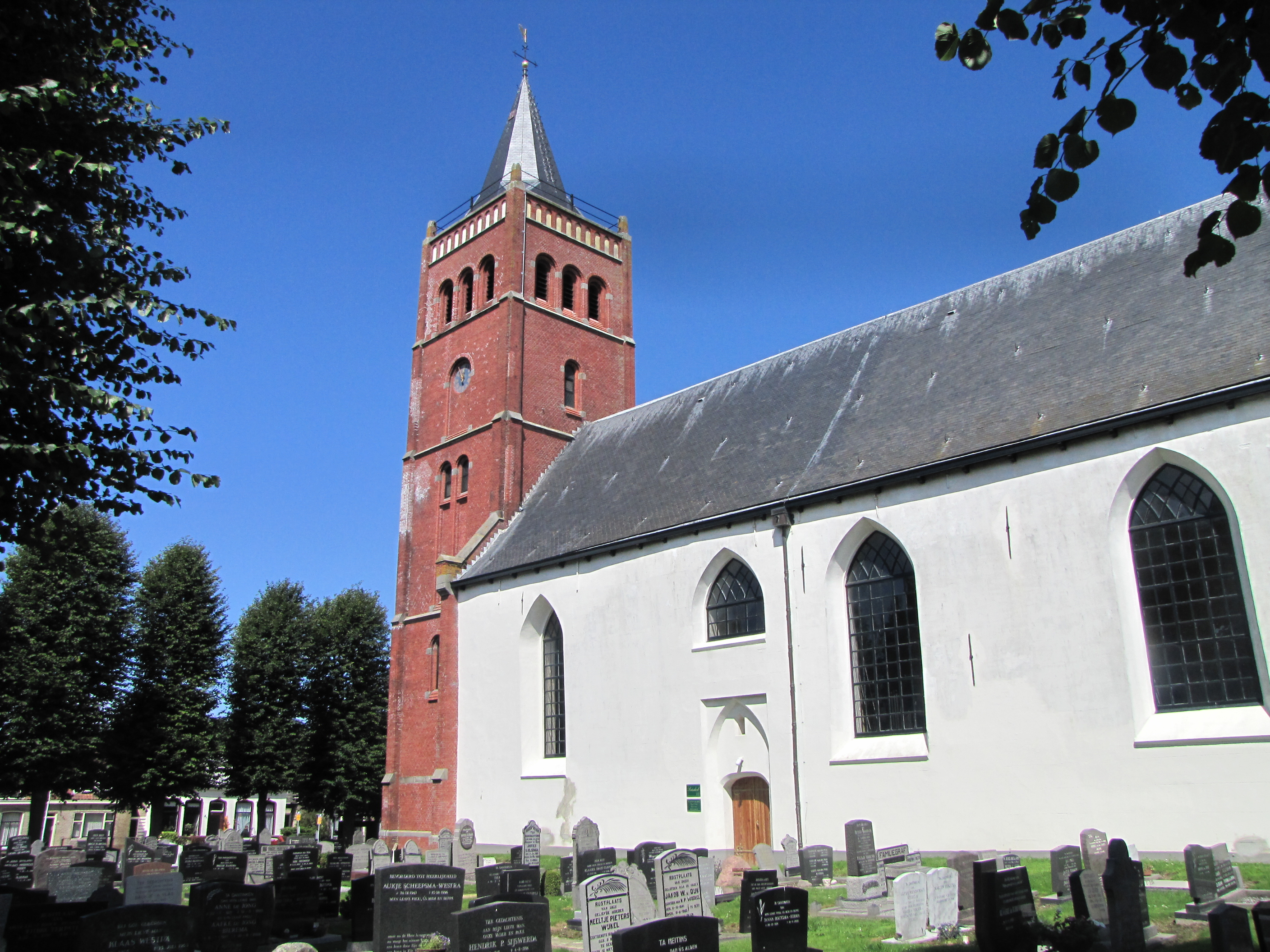 Sexbierum, Kirche